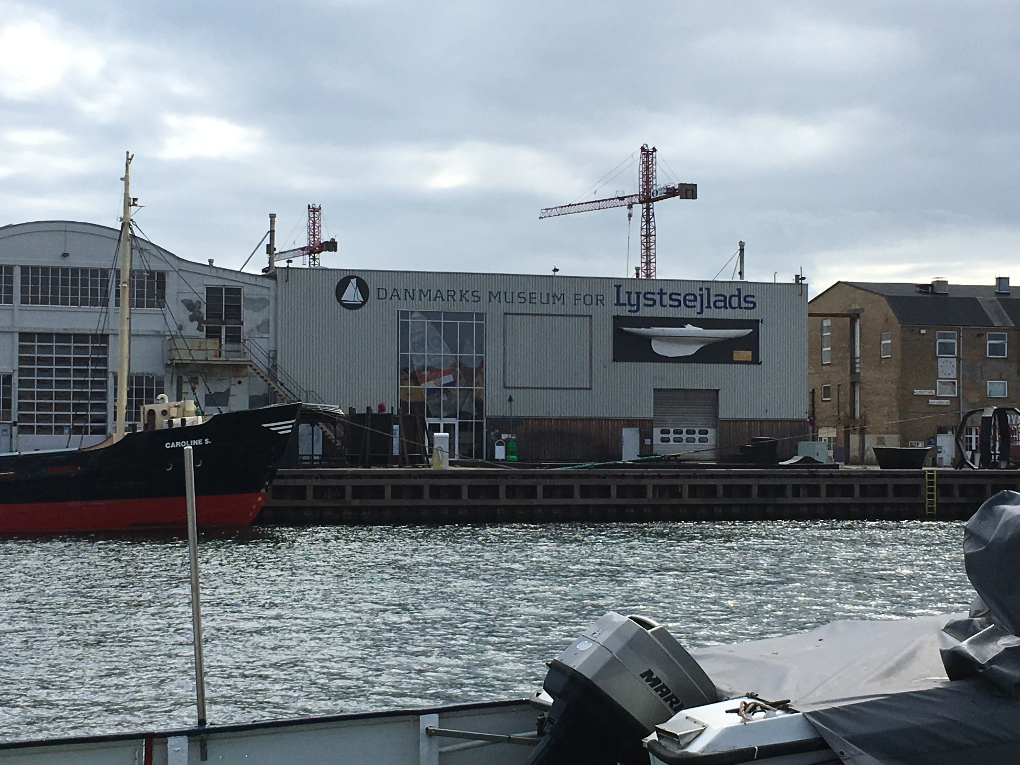 Danmarks Museum for Lystsejlads set fra den anden side af havnen i 2019